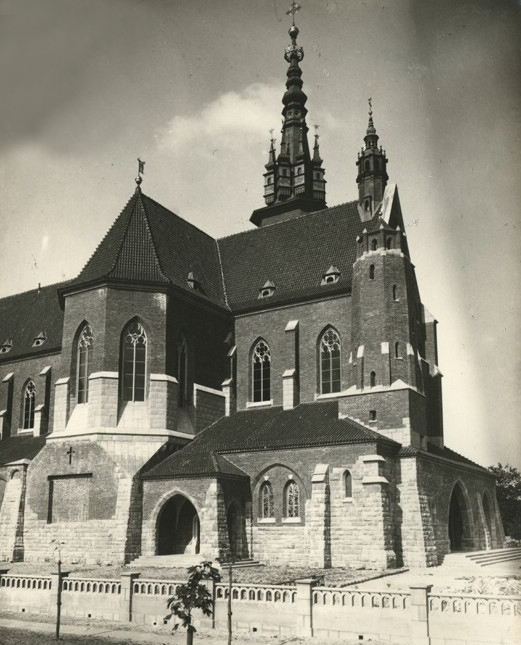 Костел 1935 р., м. Ковель, вул. 3-го Березня